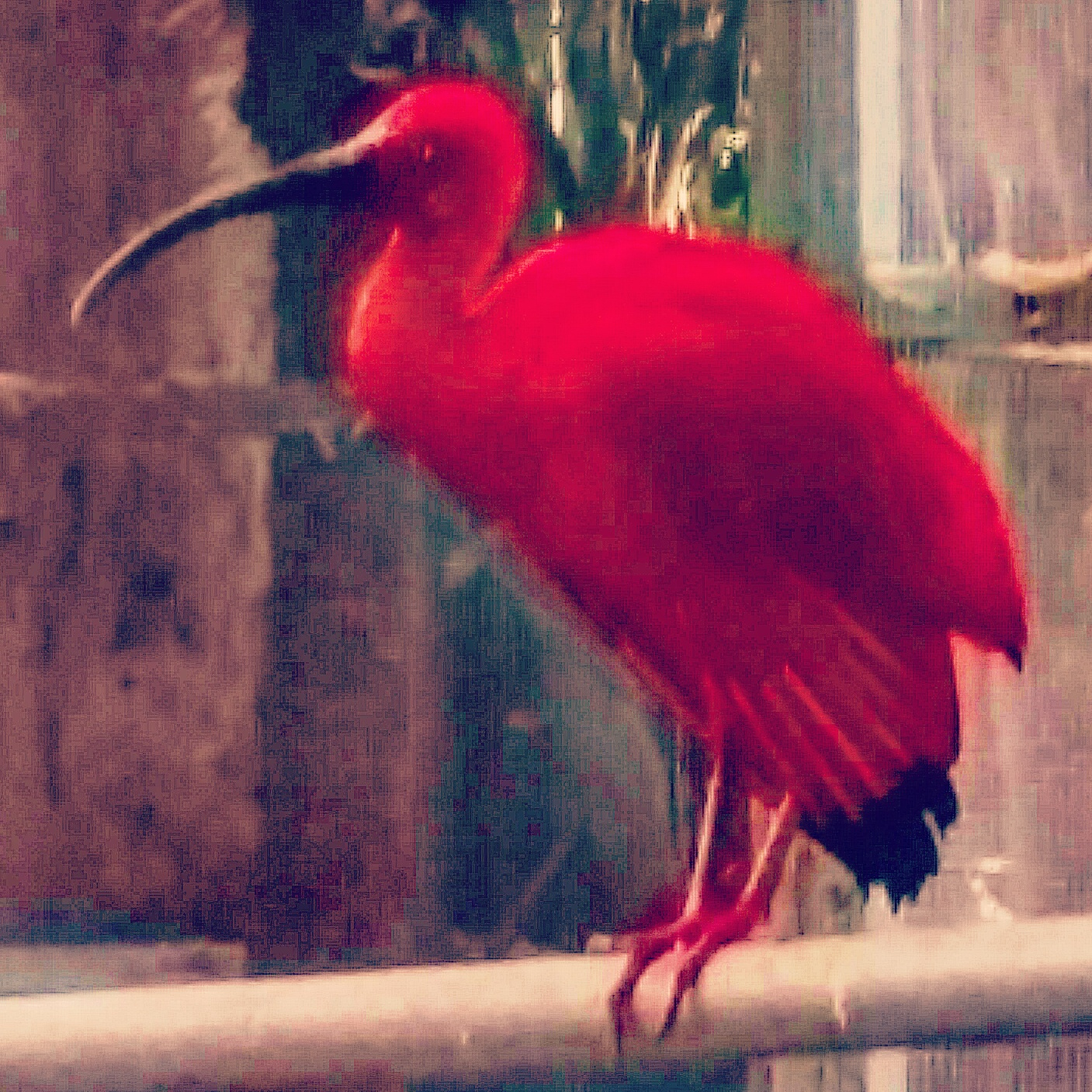 מגלן שני